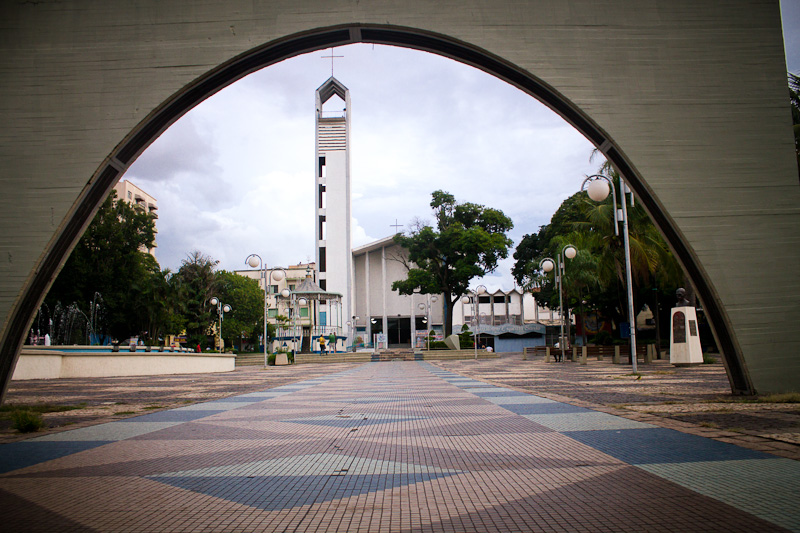 Catedral no centro de Bauru, São Paulo, Brasil.